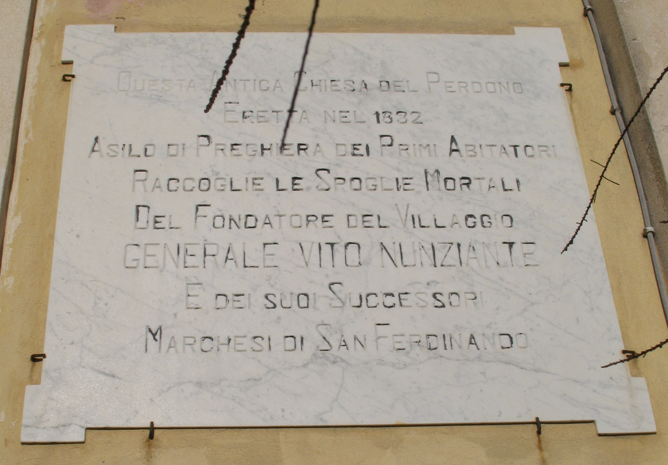 San Ferdinando, chiesa del Perdono, lapide famiglia Nunziante